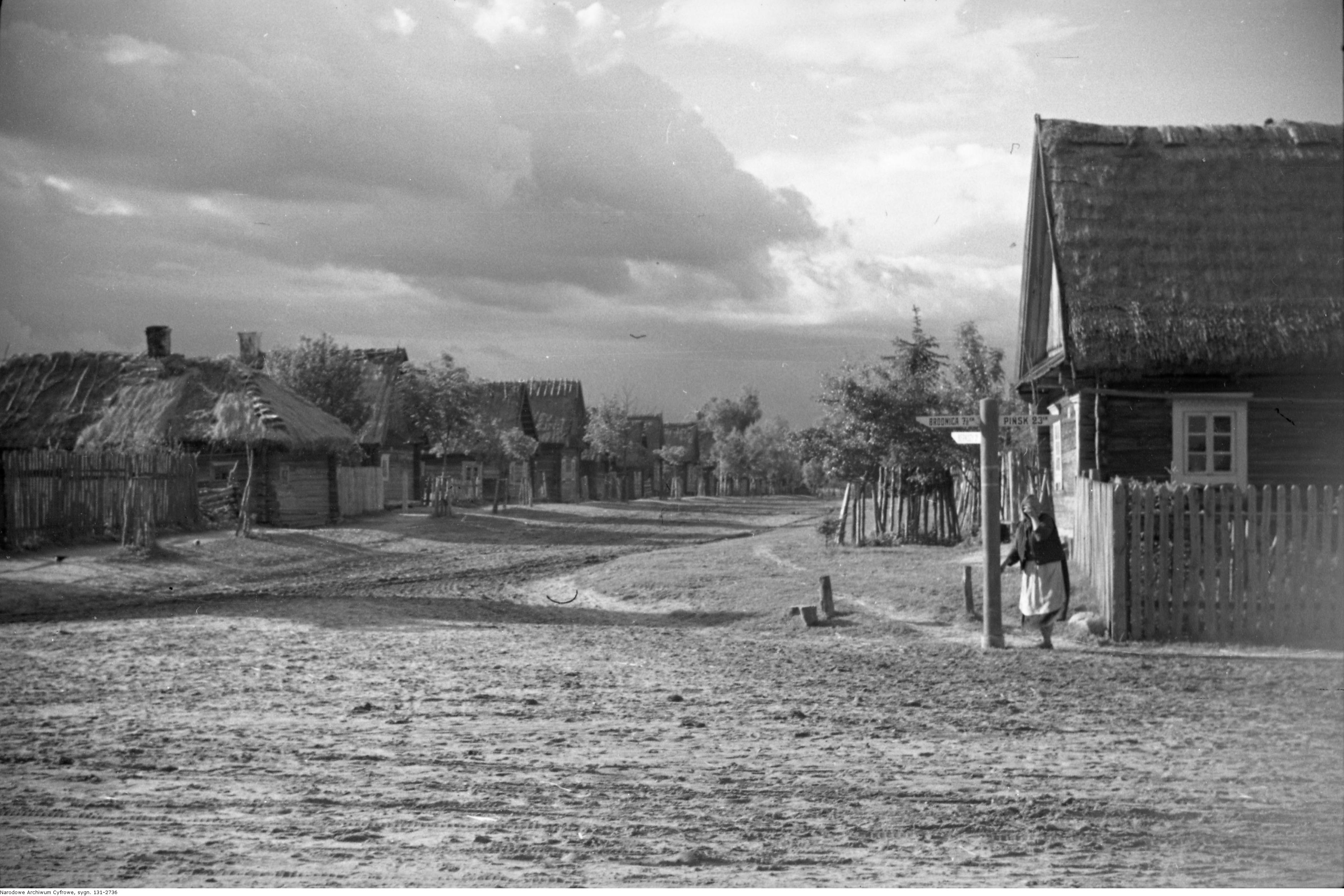 Ulica w nierozpoznanej wsi.